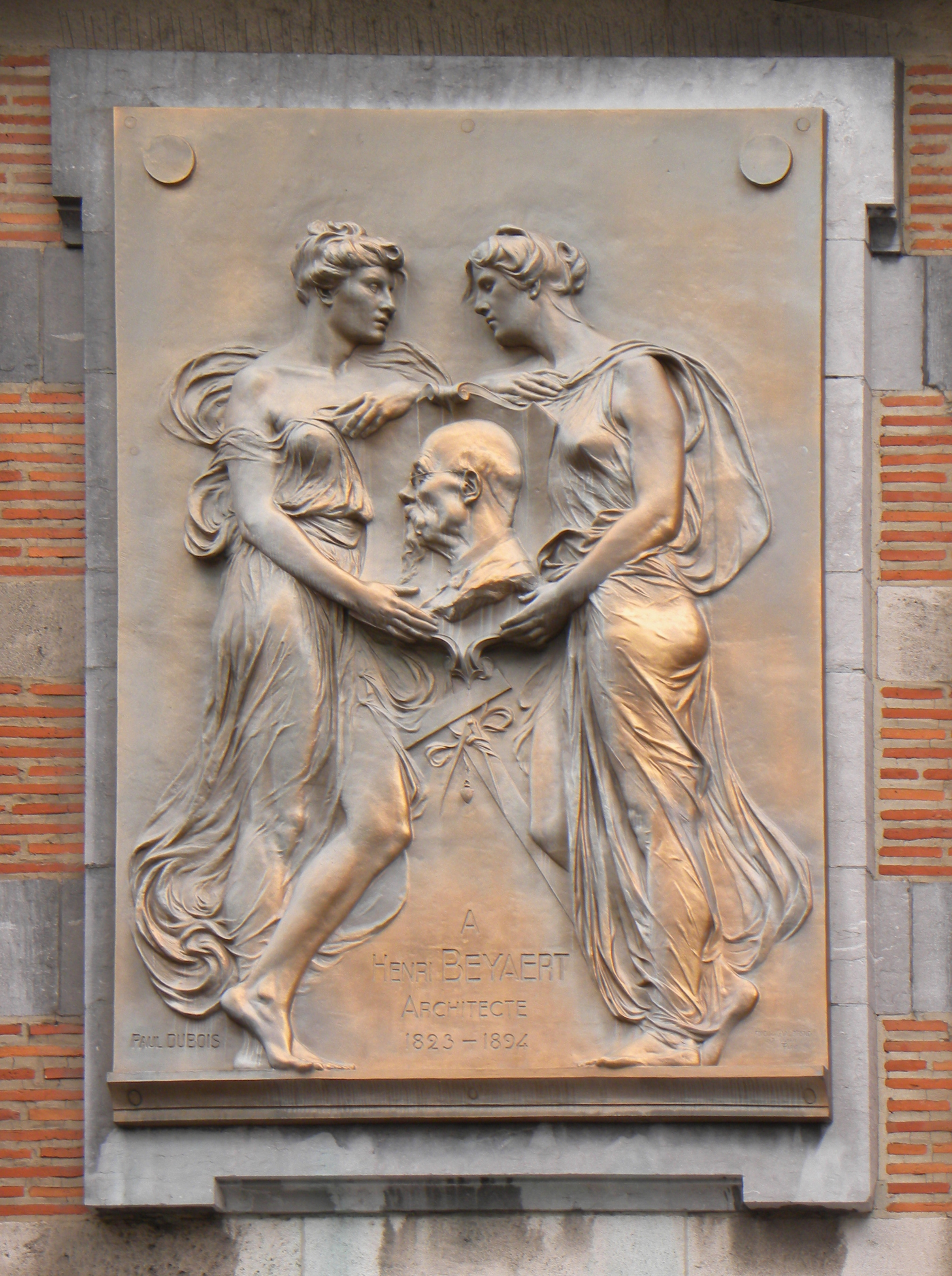 L'architecte Henri BEYAERT, 1823-1894. Plaque commémorative due à Paul Dubois. Situé à Bruxelles, façade du Parlement. rue Ducale à Bruxelles